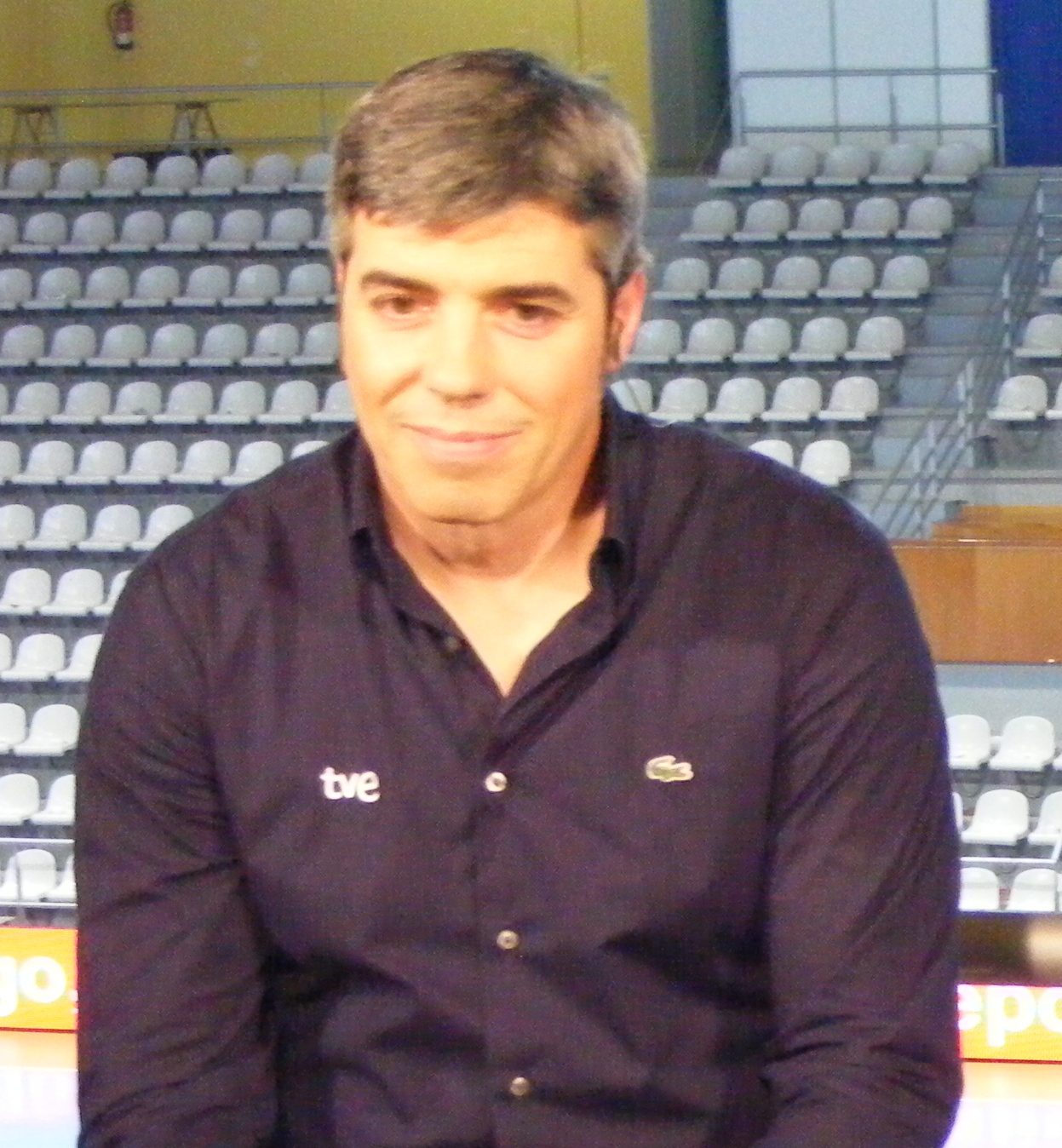 Alberto Urdiales comentarista español no pavillón de Travesas en Vigo (Pontevedra)